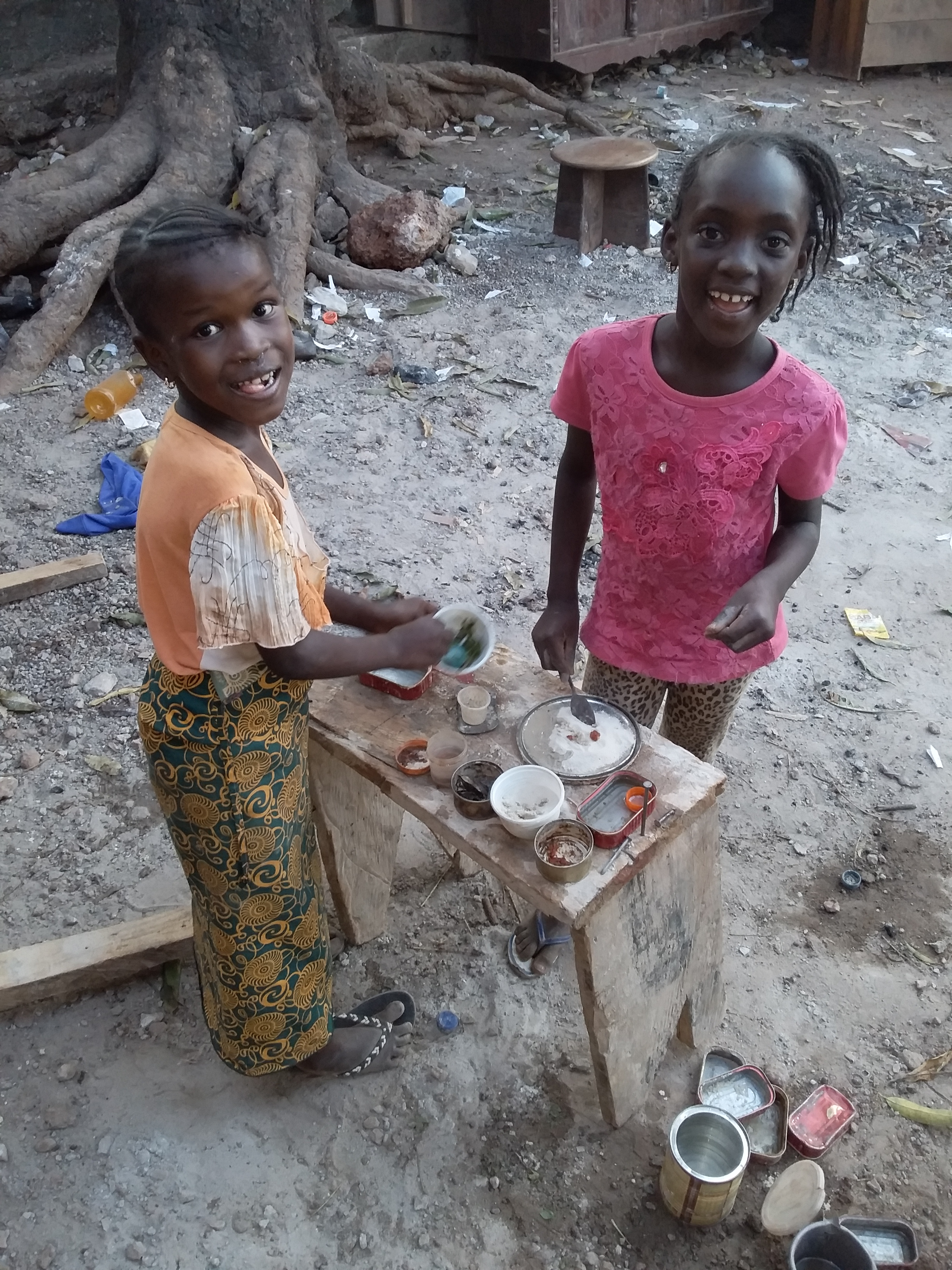 C'est un image des enfant qui jouer a la maison